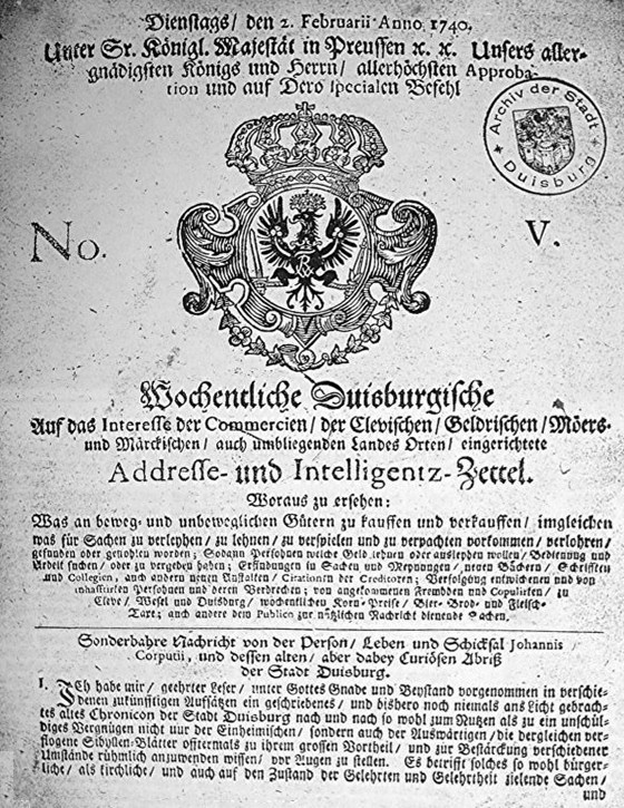 Duisburgische Addresse- und Intelligentz-Zettel, Feb 2 1740, page 1